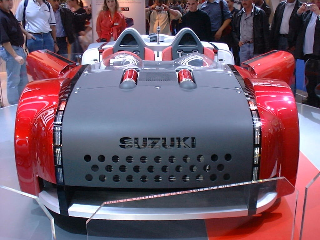 Quelle: selbst fotografiert auf der IAA 2001 Fotograf: Späth Chr.